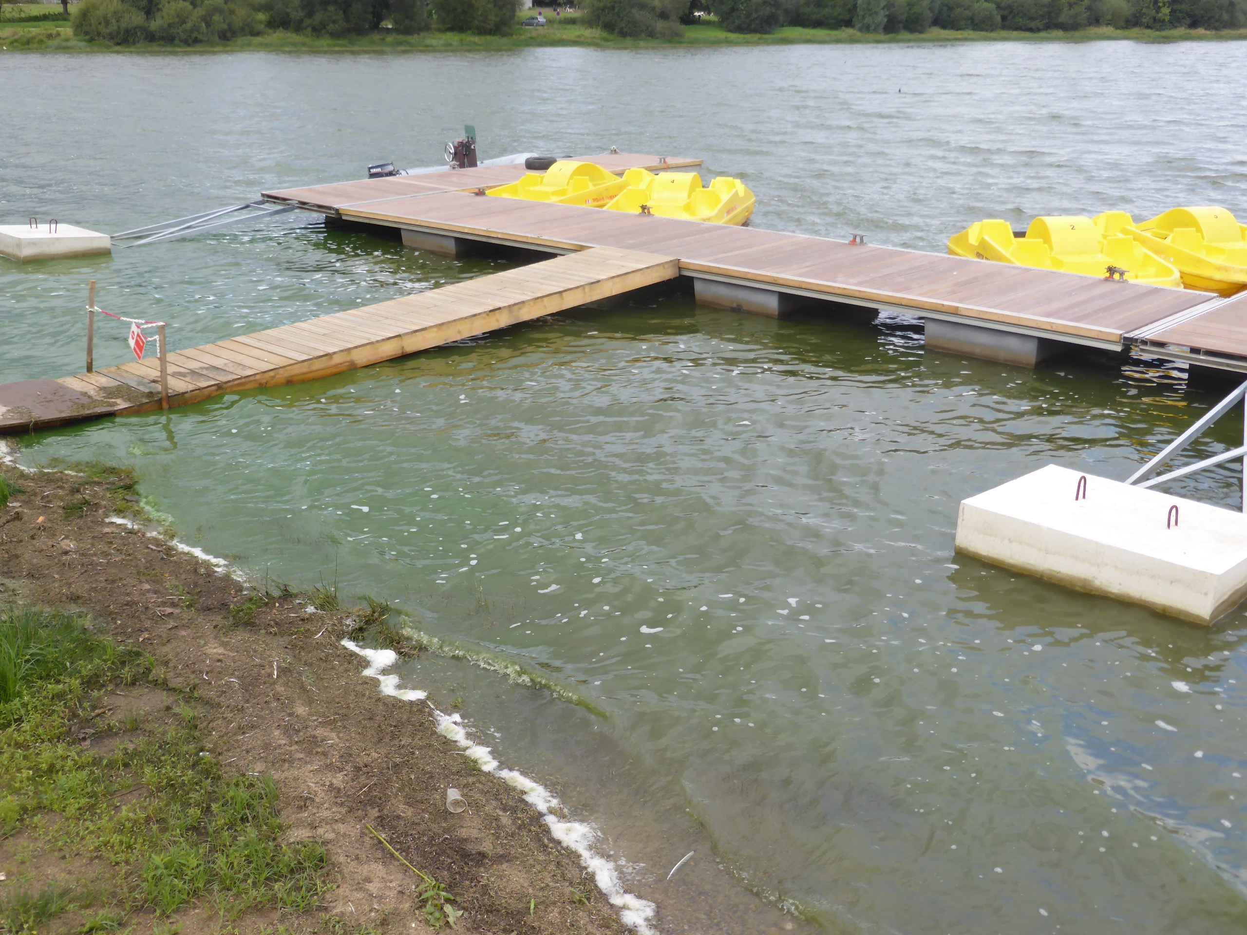 Pédalos sur l'étang de Châtillon en Vendelais (35)